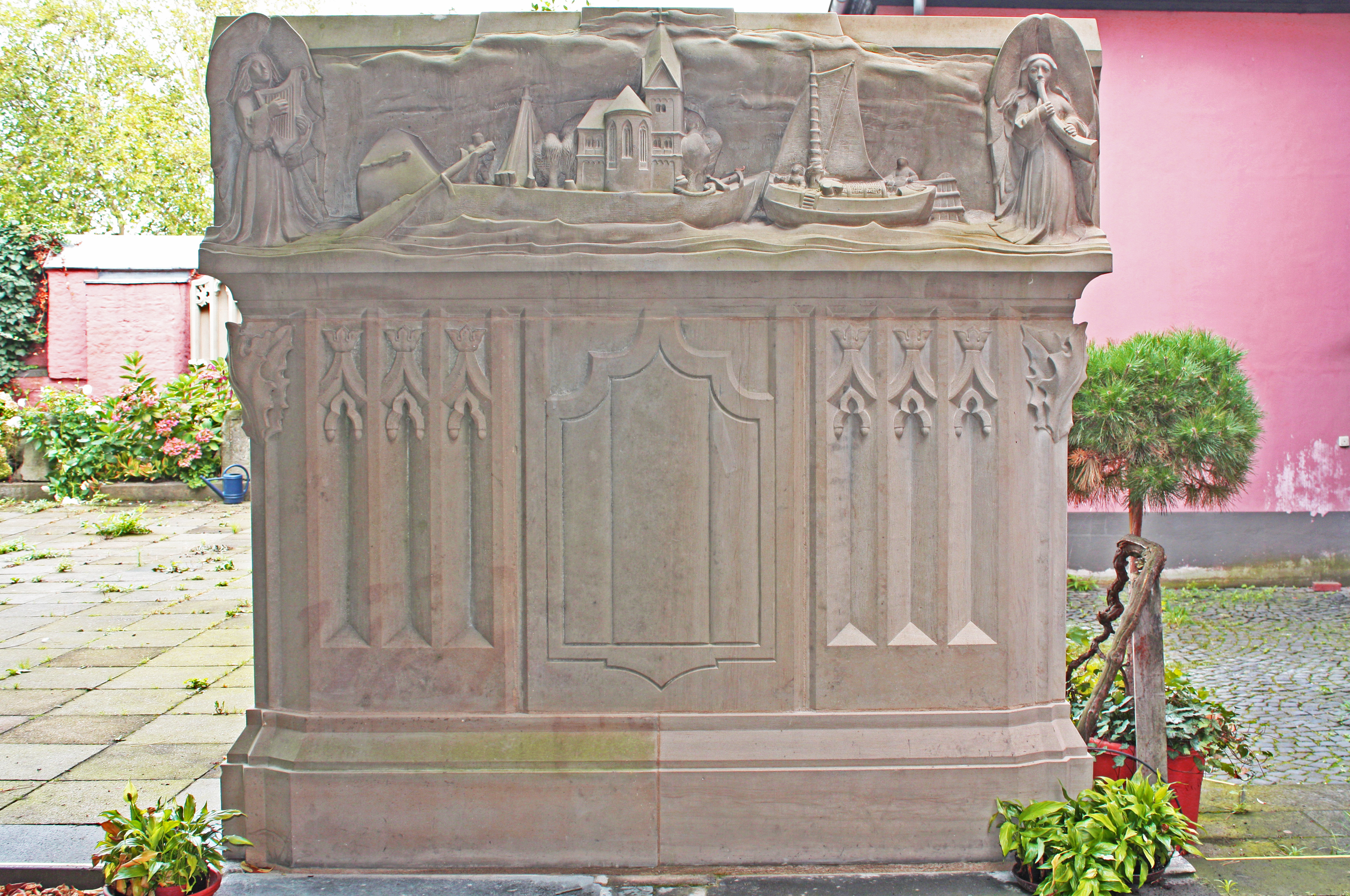 Denkmal der Rheinschiffer vor St. Maria Lyskirchen